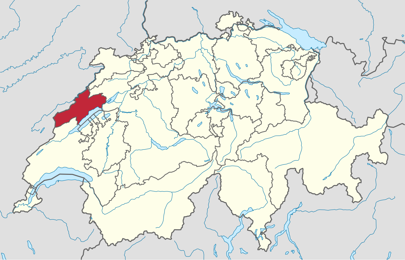 Lage vom Kanton Neuenburg in der Schweiz.